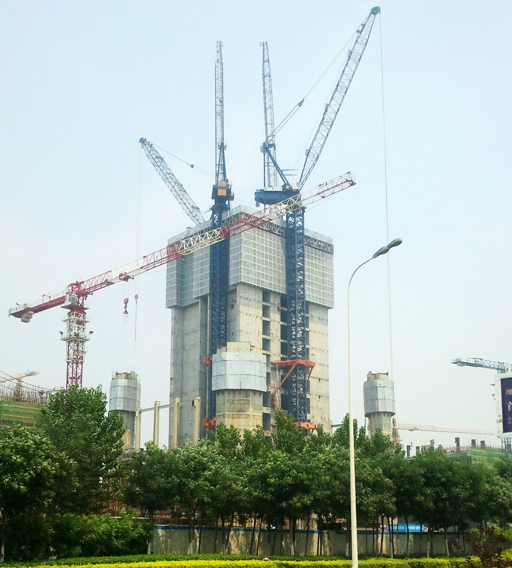 高银金融117大厦2013年6月13日建设情况